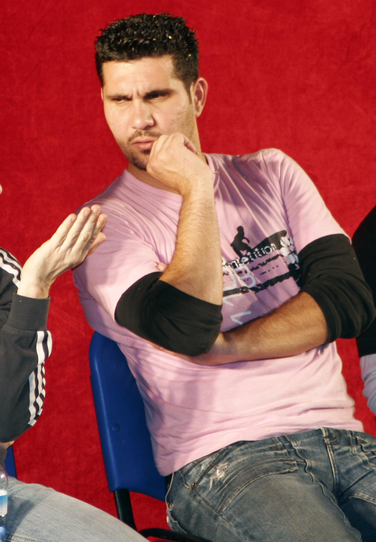 שלומי קוריאט